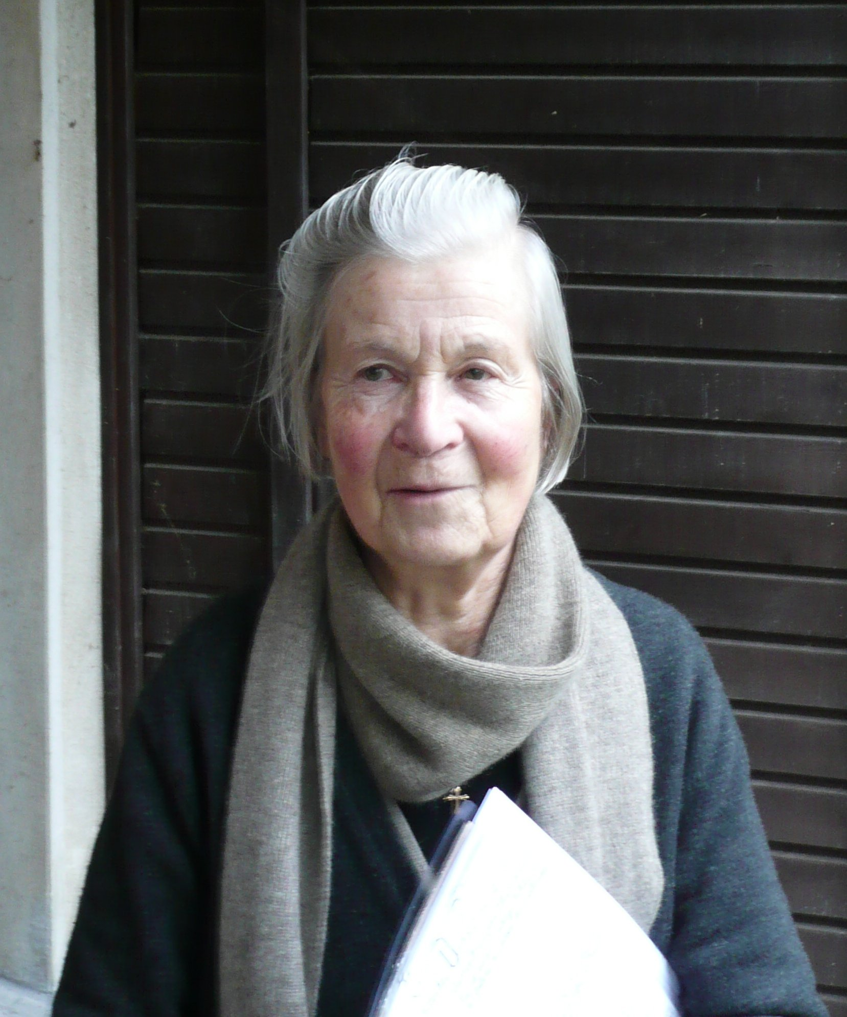 Porträt der Künstlerin Heidrun Borgwardt im April 2013